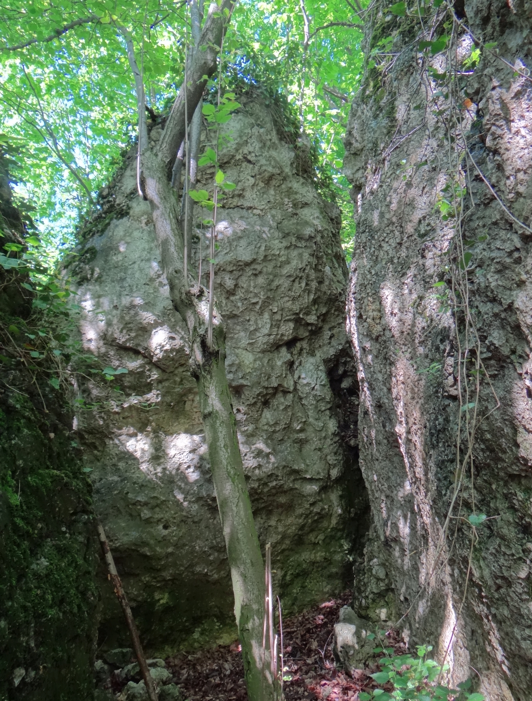 Bukowa Skała w Dolinie Szklarki